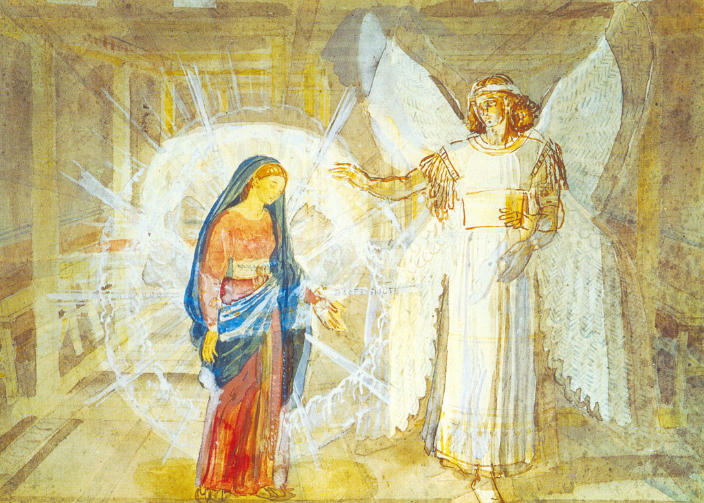 Благовещение